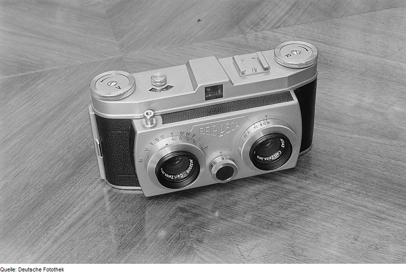 Original image description from the Deutsche Fotothek Kleinbildstereokamera Belplasca des VEB Kamera- und Kinowerke Dresden auf der Leipziger Herbstmesse 1954